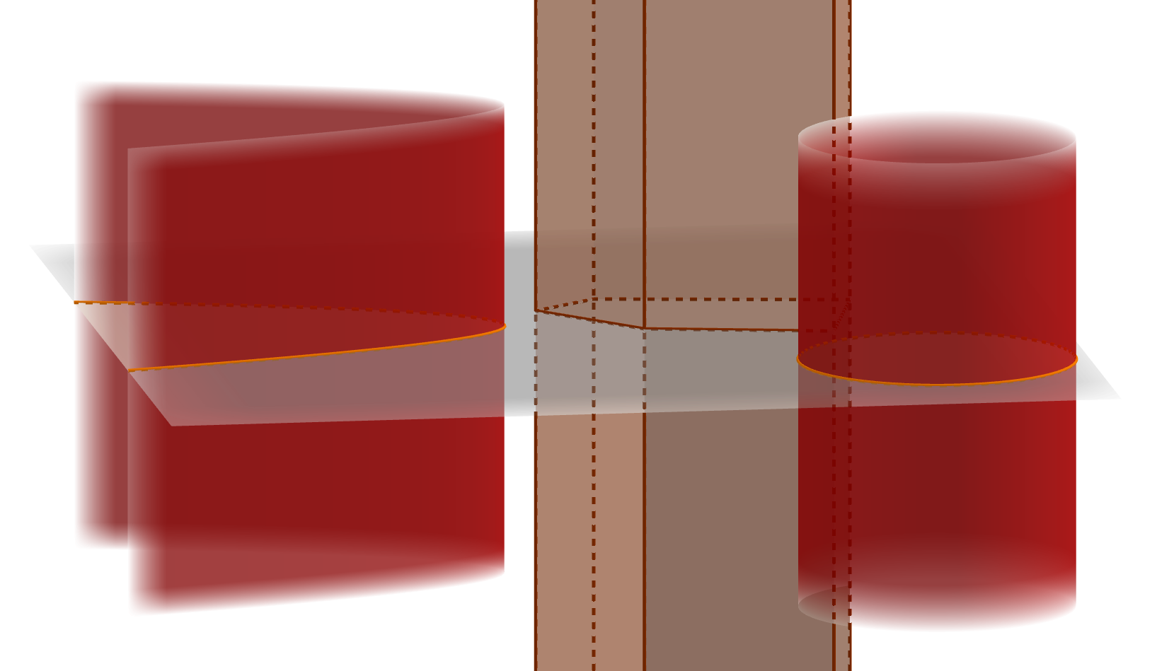 中文（中国大陆）: 用于